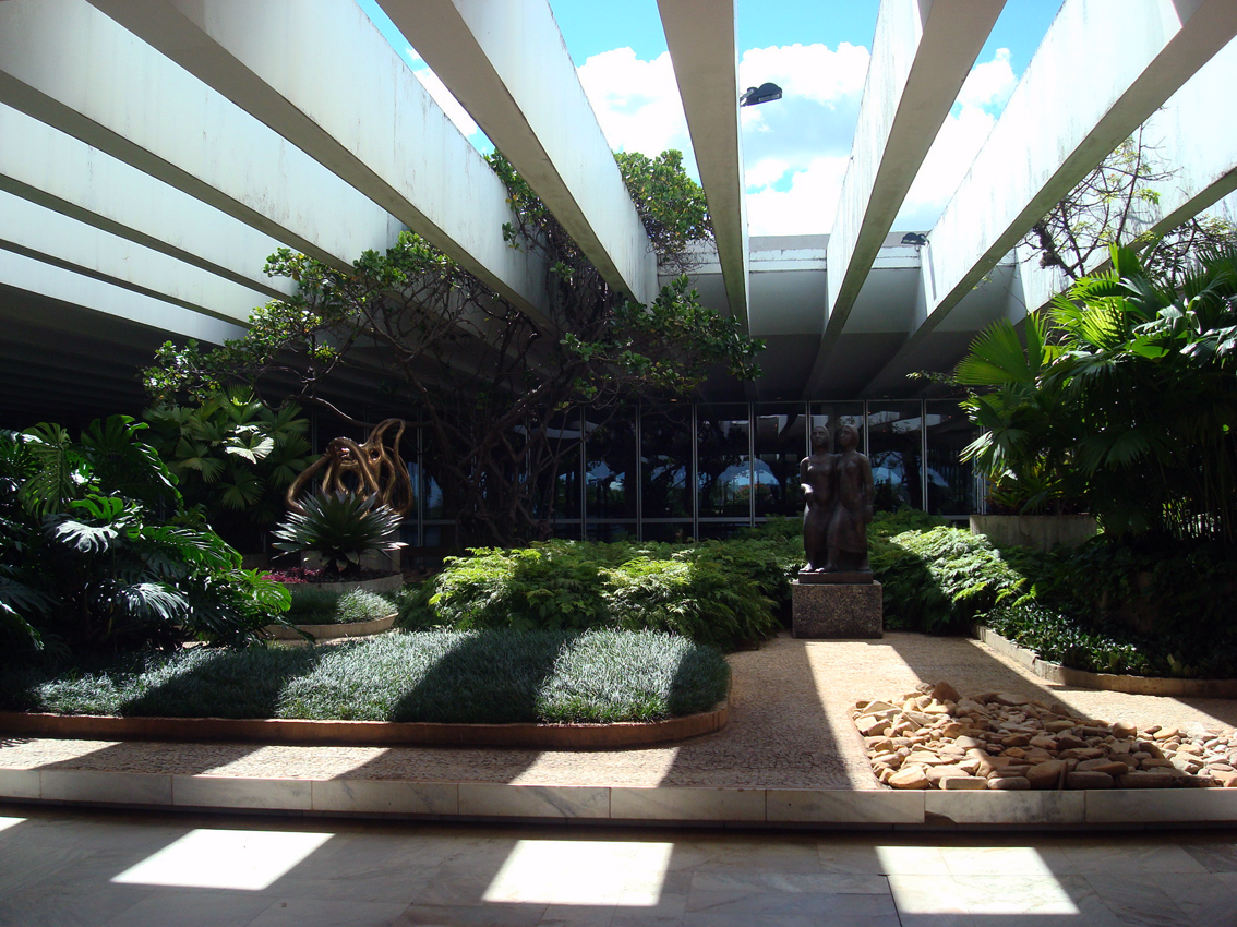 Itamaraty Palace, modernist interior garden, Brasília, Brazil.